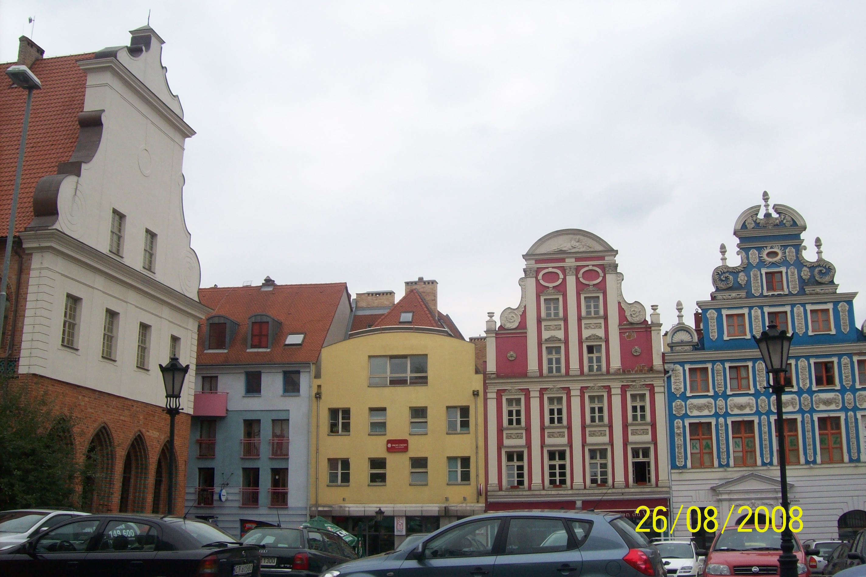 Rynek Sienny w 2008 (Szczecin)